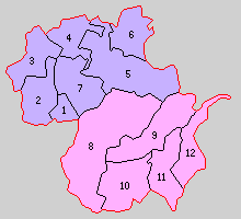 島根県鹿足郡の町村制時点の町村。